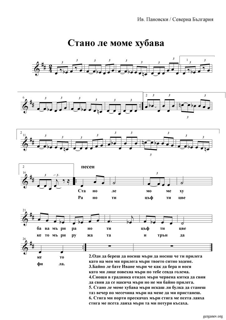 Песен на Иван Пановски. Народен певец от с. Борован Врачанска област